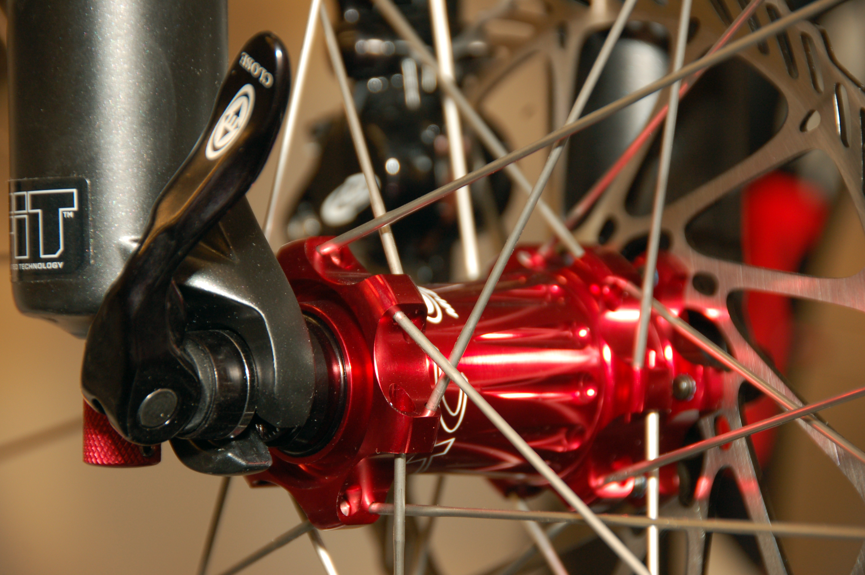 Detail Fahrradtechnik; mit freundlicher Genehmigung von - fahrradvermietung am Kurfürstendamm